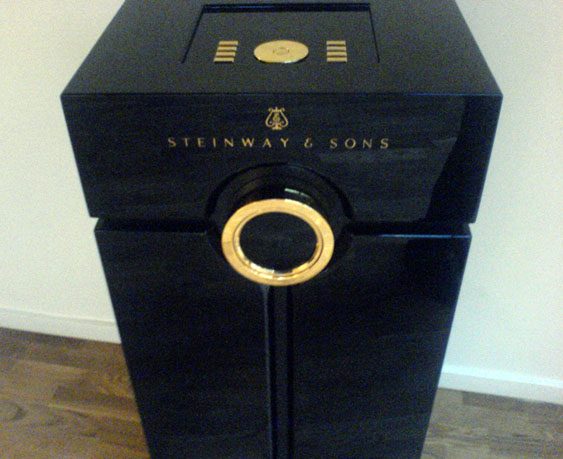 Steinway Lyngdorf Model D audio system head unit.